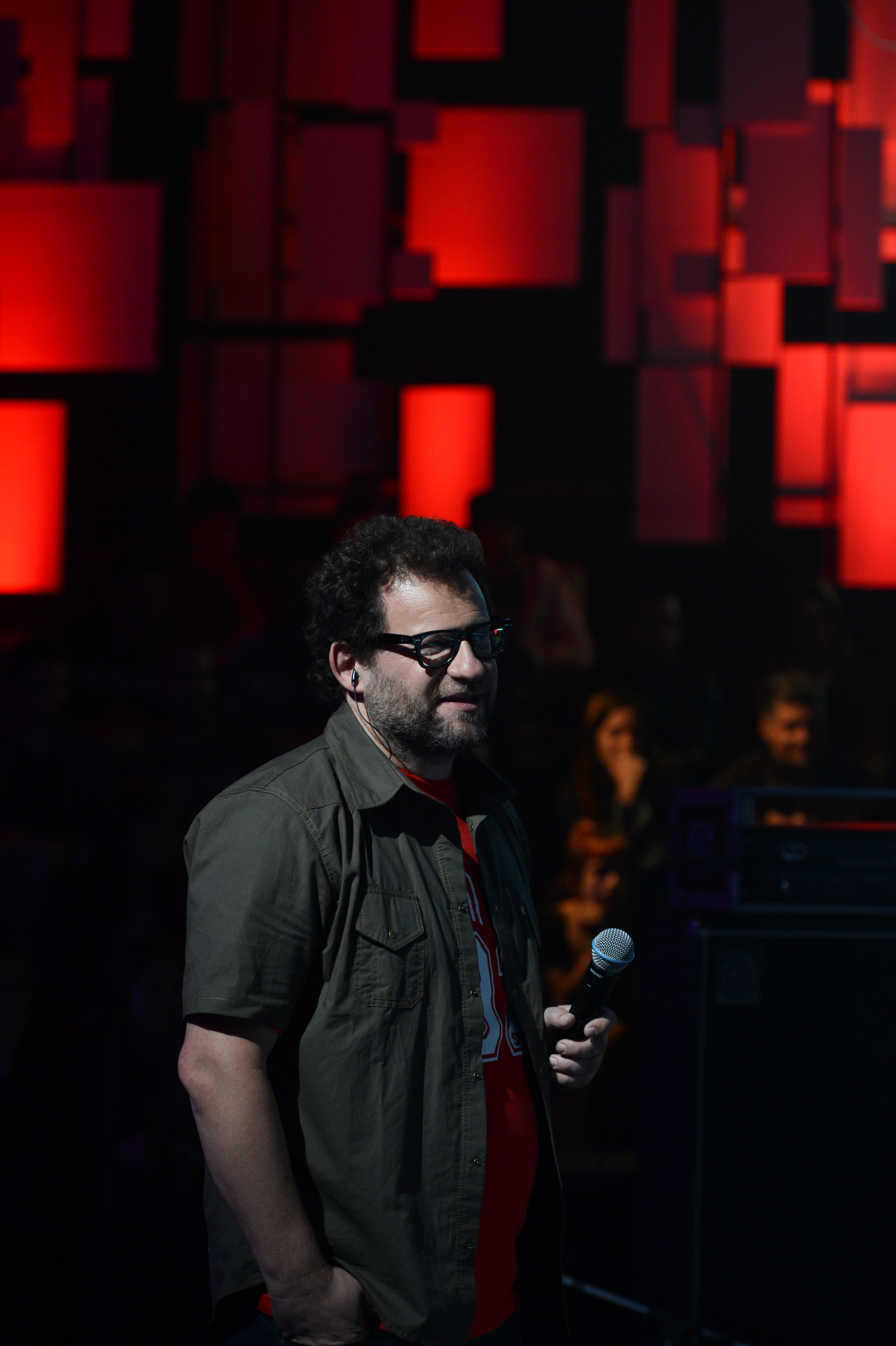 Gillespi. Homenaje Gustavo Cerati. 04.11.2014. Foto TVP 2014